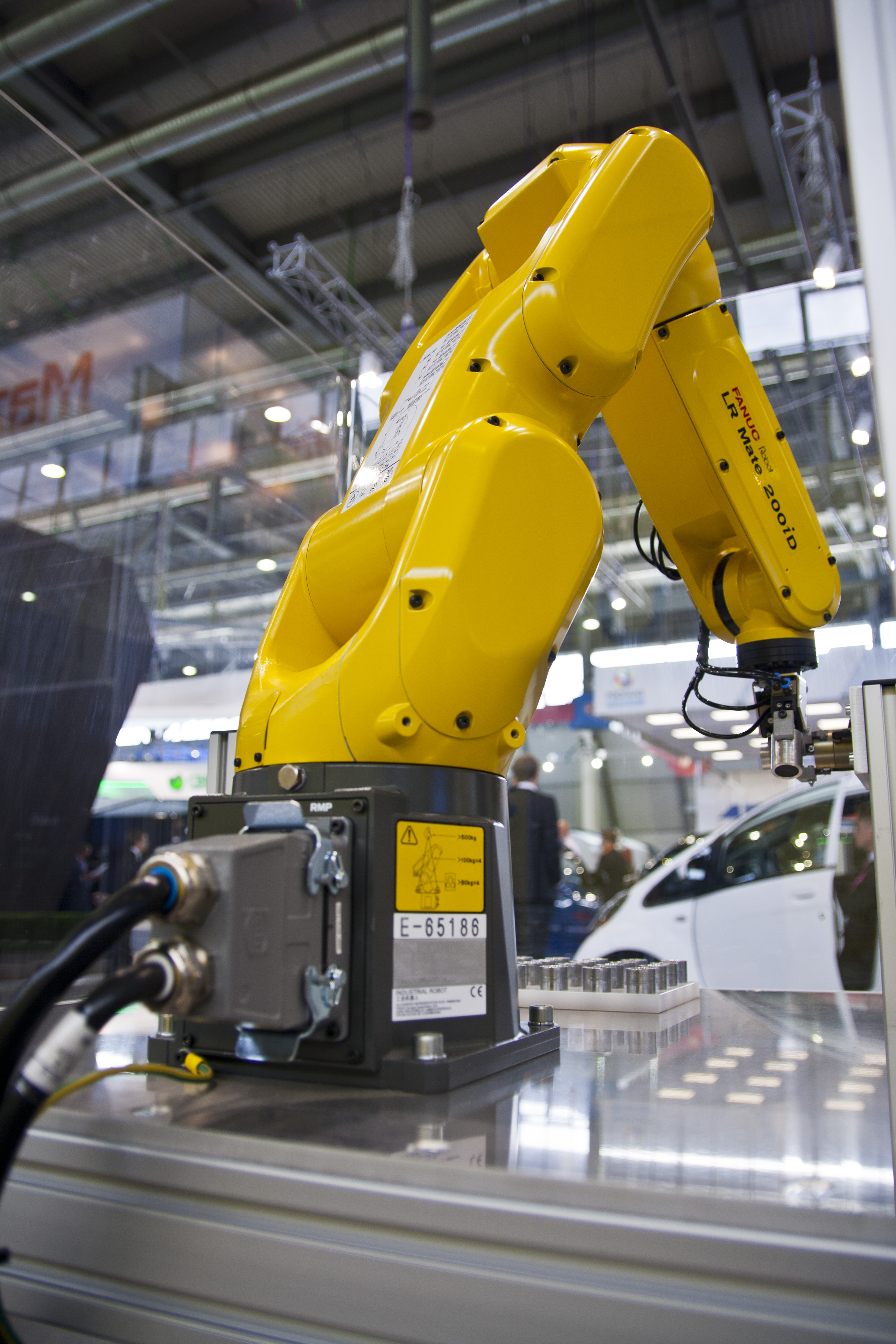 Робот FANUC LR-Mate 200iD